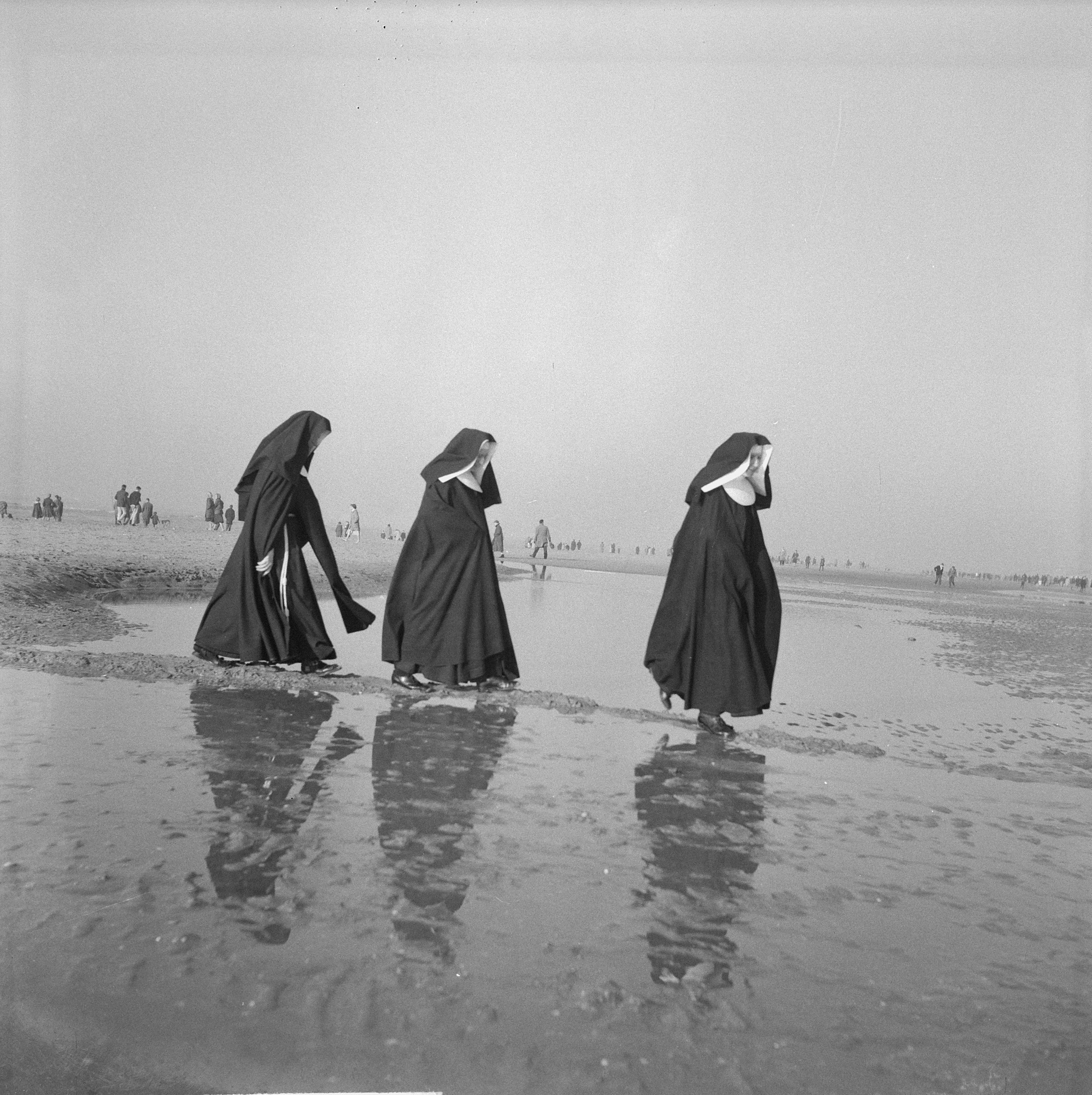 Collectie / Archief : Fotocollectie Anefo Reportage / Serie : [ onbekend ] Beschrijving : Nonnetjes aan het strand te Zandvoort Datum : 20 februari 1961 Locatie : Noord-Holland, Zandvoort Trefwoorden : stranden Fotograaf : Nijs, Jac. de / Anefo Auteursrechthebbende : Nationaal Archief Materiaalsoort : Negatief (zwart/wit) Nummer archiefinventaris : bekijk toegang 2.24.01.03 Bestanddeelnummer : 912-1172